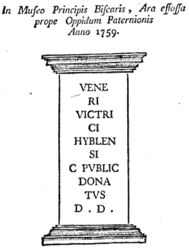 Cippo rinvenuto nei pressi di Paternò.